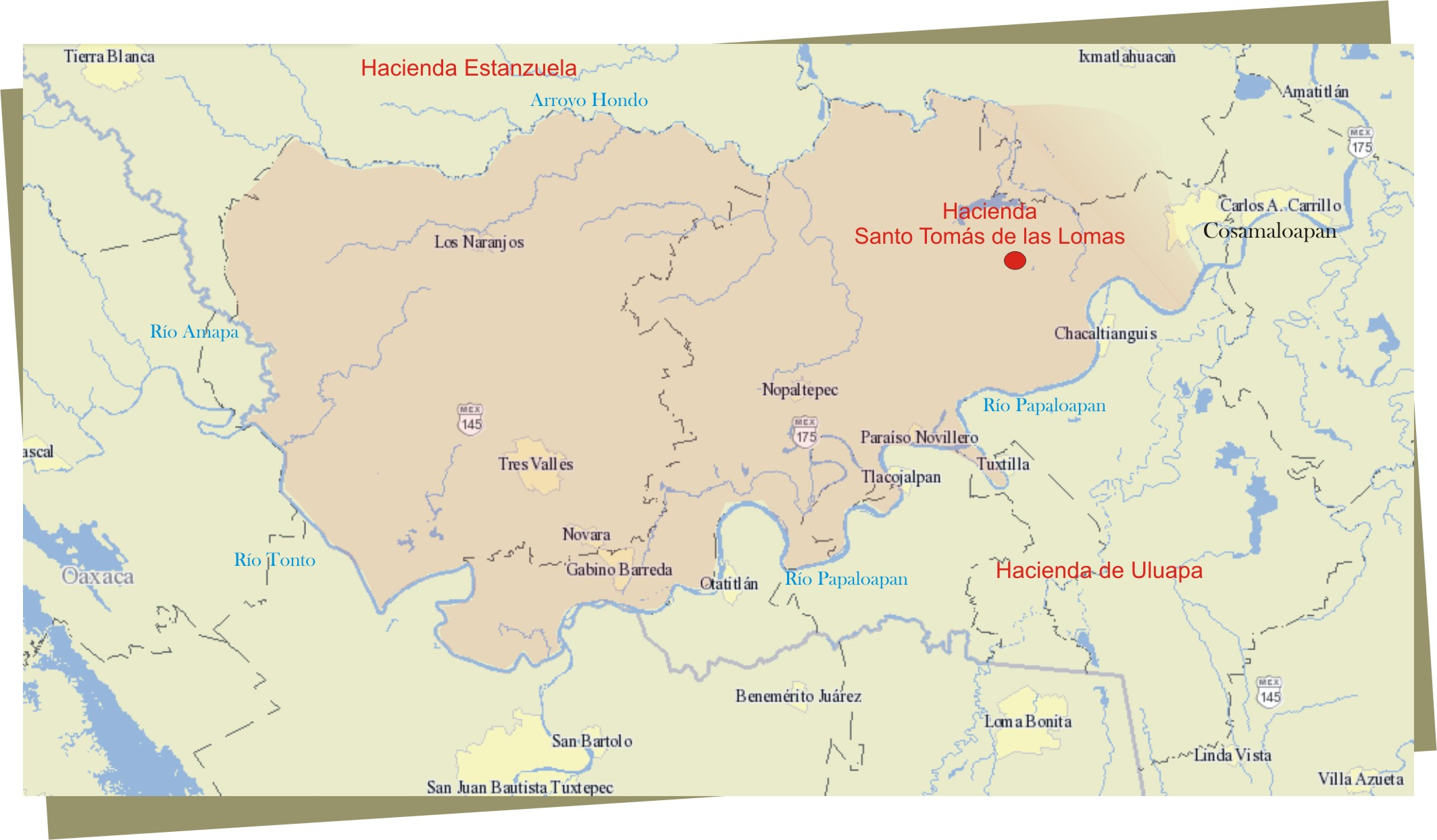 Mapa del territorio de la hacienda Santo Tomás de las Lomas. Siglo XVII-XIX. Veracruz, México.